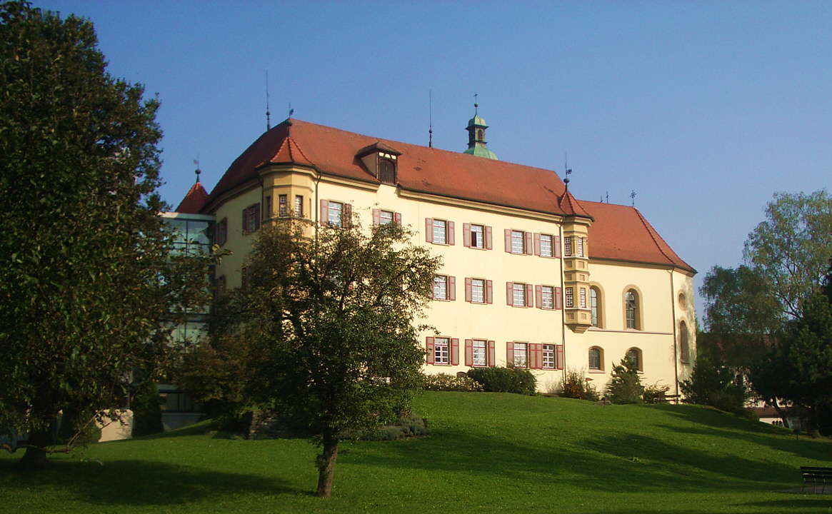 Meckenbeuren, Germany: Stiftung Liebenau, Schloss